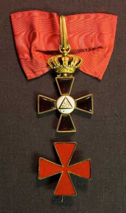 Halskors samt bröstkors för Riddare av Carl XIII:s orden